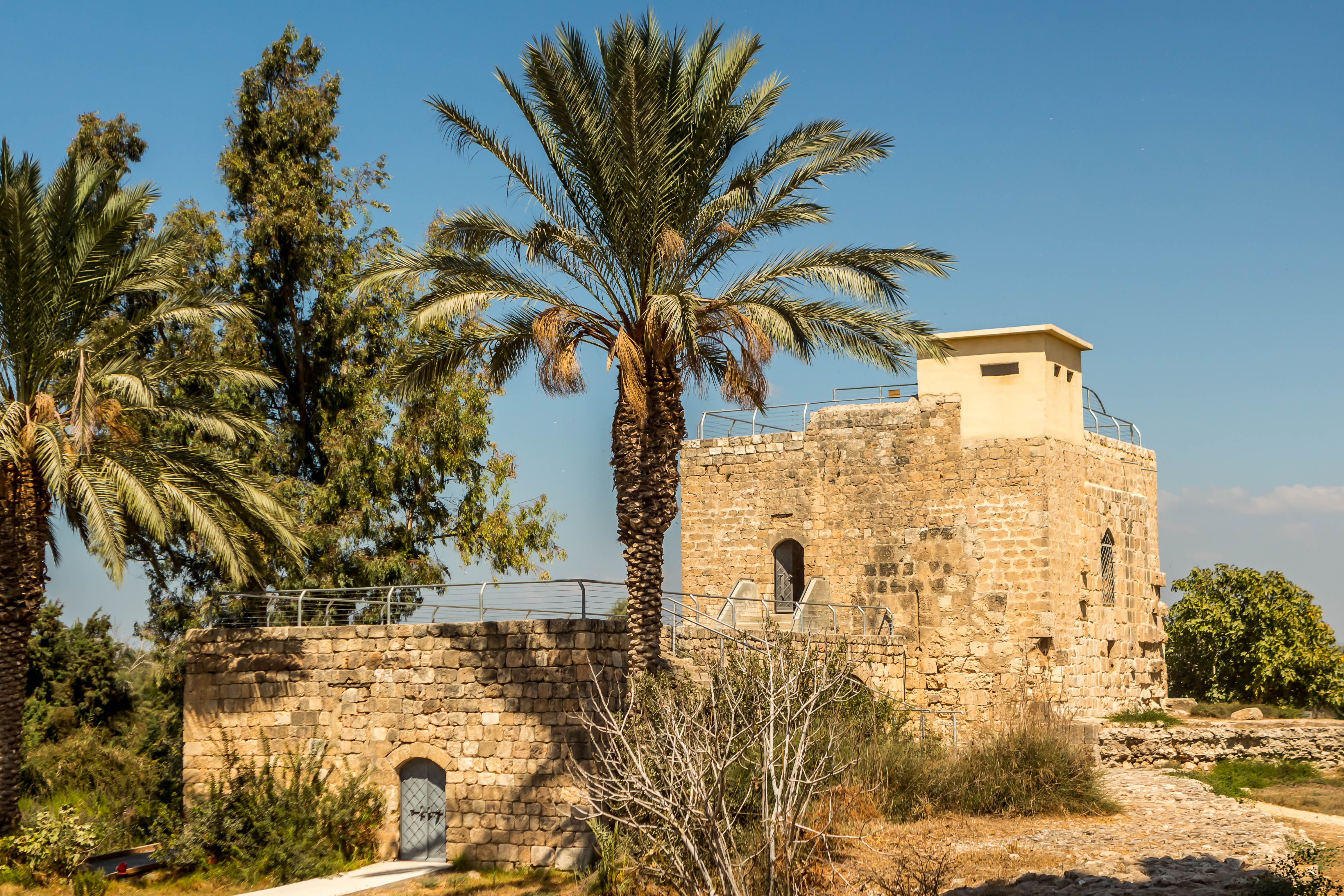 שמורת טבע בעמק זבולון, מזרחית לקריית ביאליק. השמורה כוללת הן את המעיינות והביצות המהווים את מקורו של נחל נעמן והן את האתר הארכאולוגי תל אפק. השמורה הוכרזה ב-1979 והיא משתרעת על פני 660 דונם. ב-1996 הוכרה השמורה כ"אתר רמסר" בהתאם לאמנת רמסר לשימור ולפיתוח בר-קיימא של בתי גידול לחים.